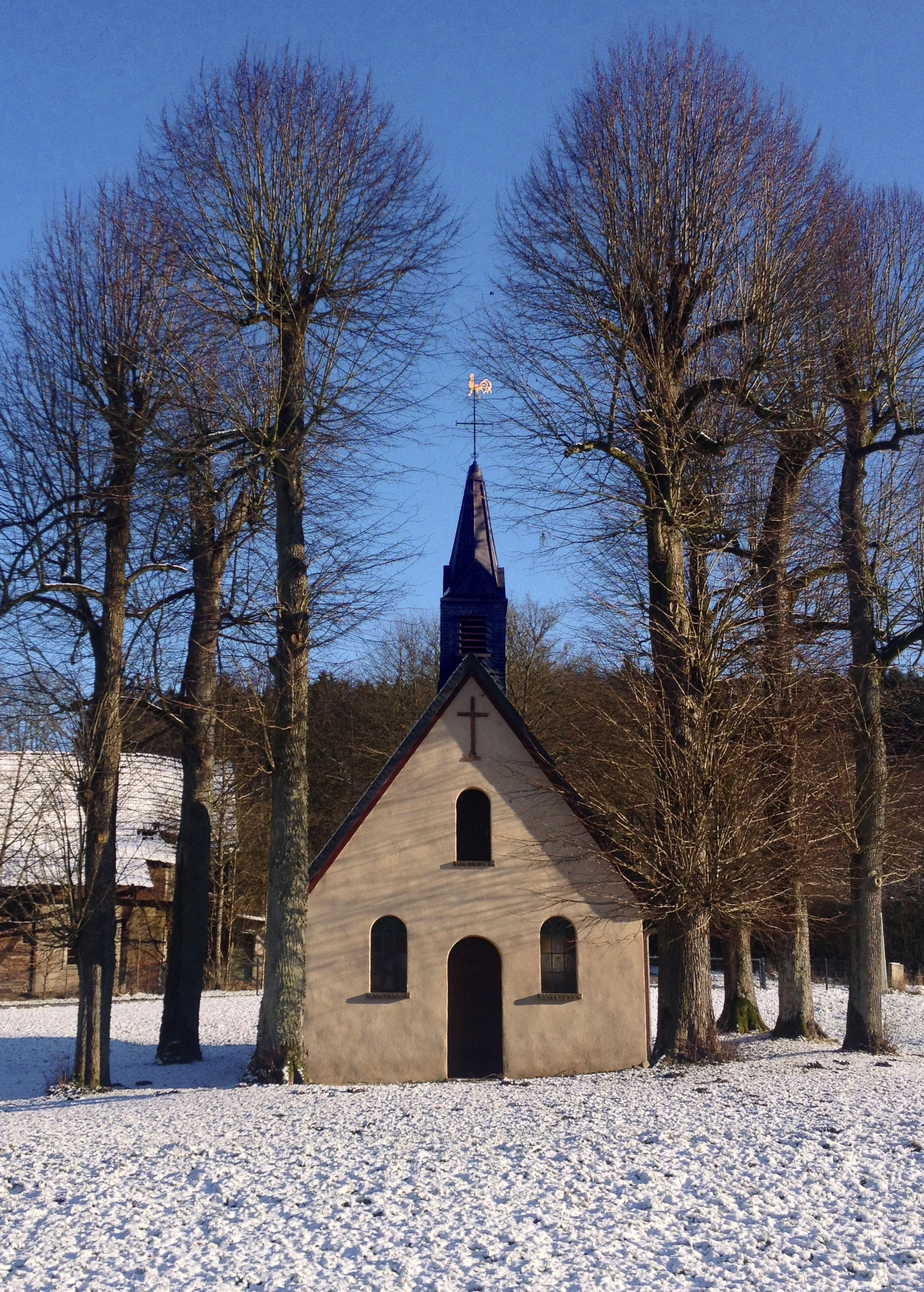 Die Matthiaskapelle in Altfinnentrop, Kreis Olpe im Winter 2014.